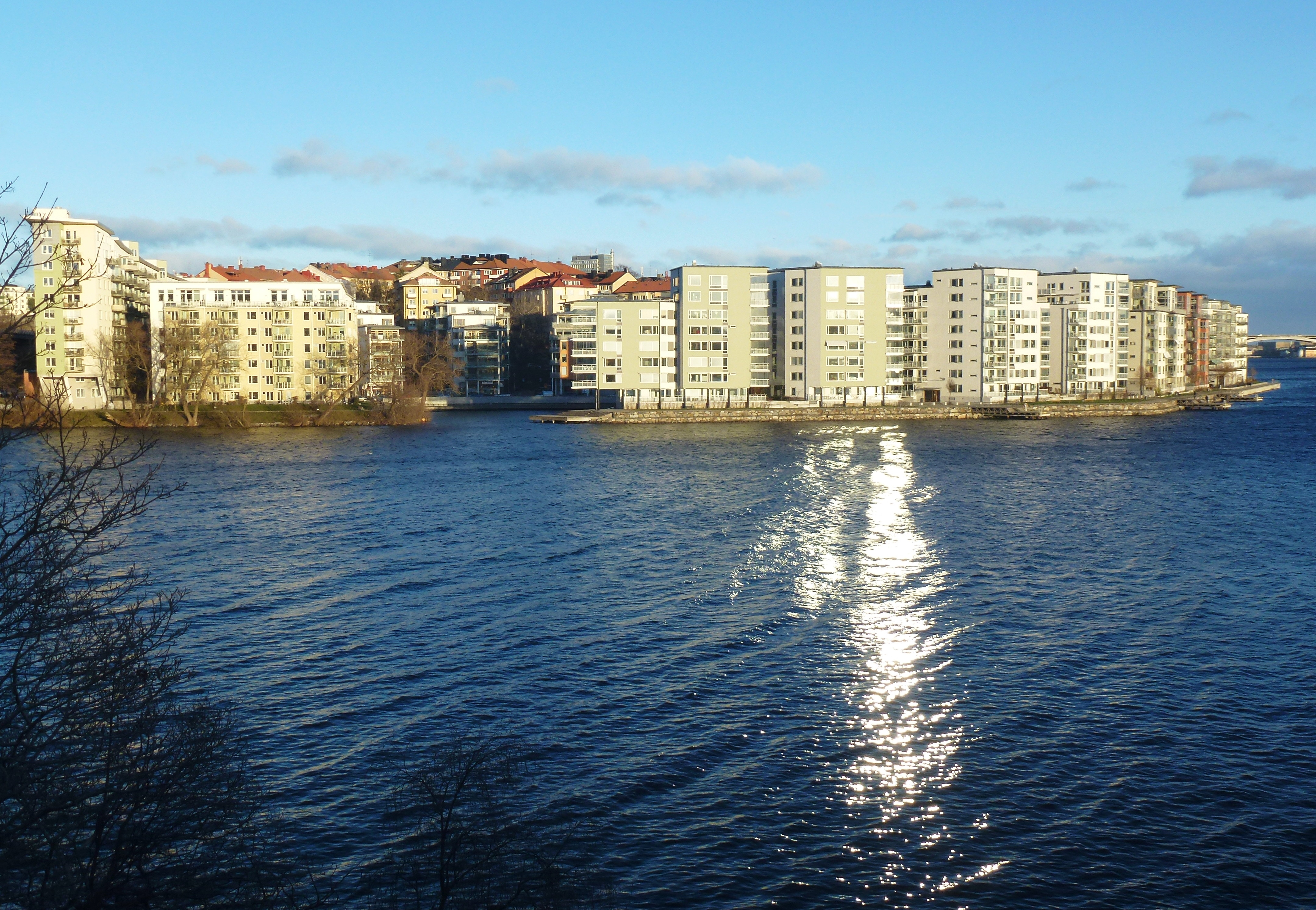 Lilla Essingen sedd från Stora Essingen